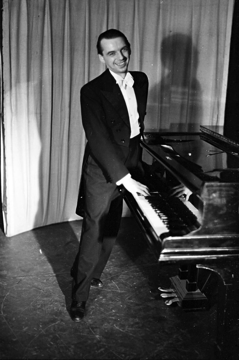 Kabarett der Komiker: Erwin Bootz singt und spielt am Flügel